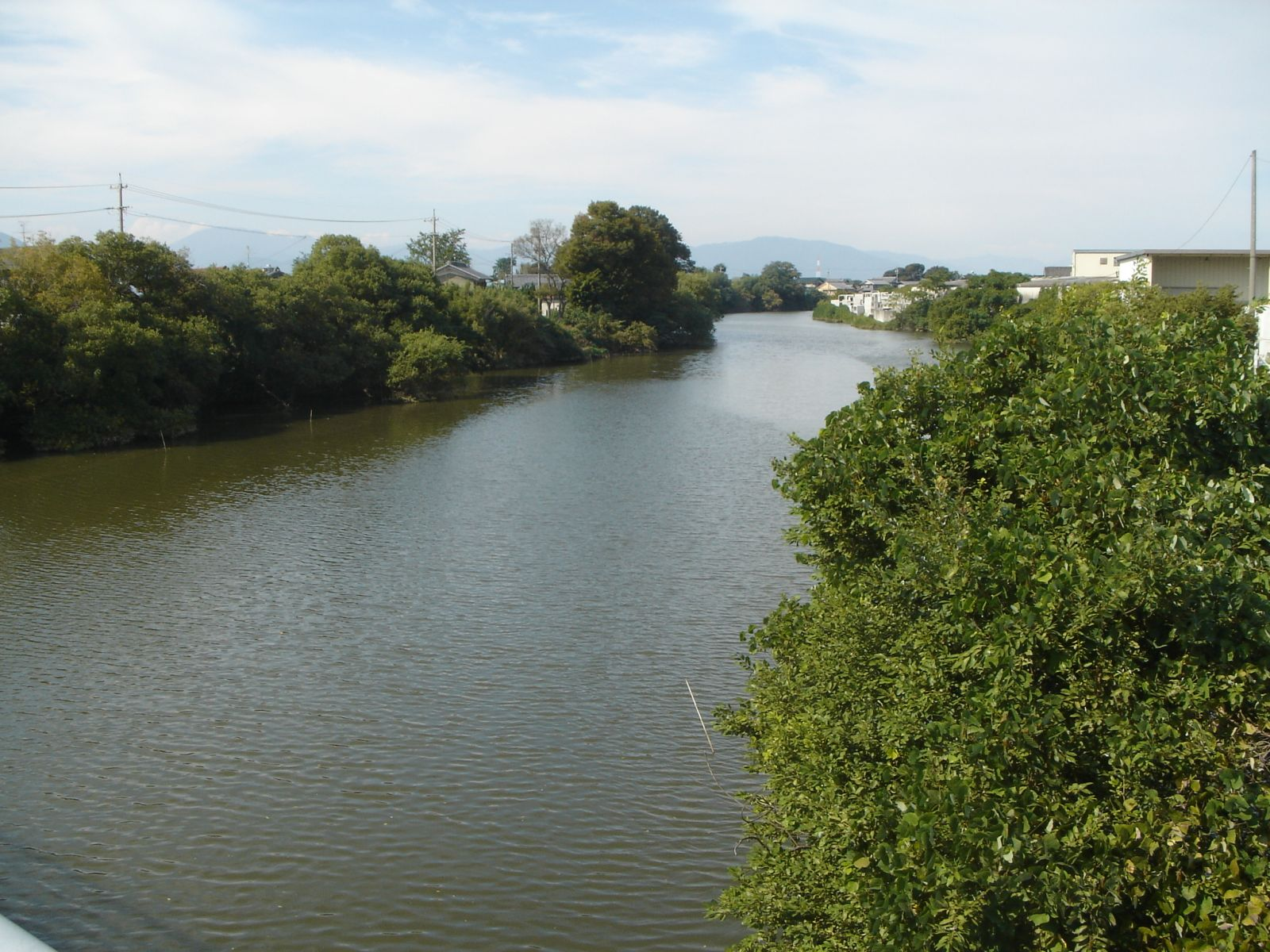 大榑川、岐阜県輪之内町・海津市平田町。平輪橋より上流を撮影